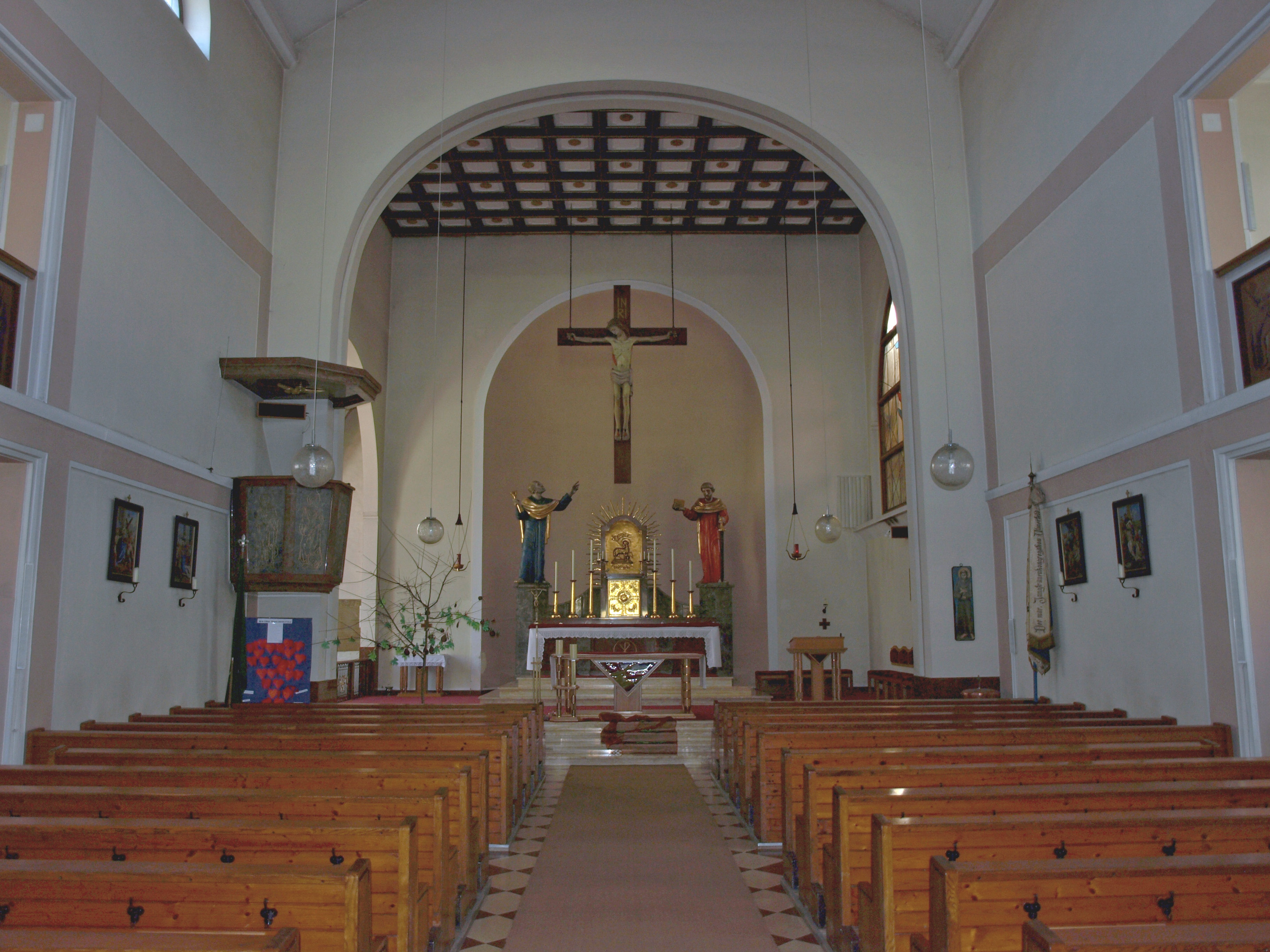 Kath. Pfarrkirche hll. Petrus und Paulus